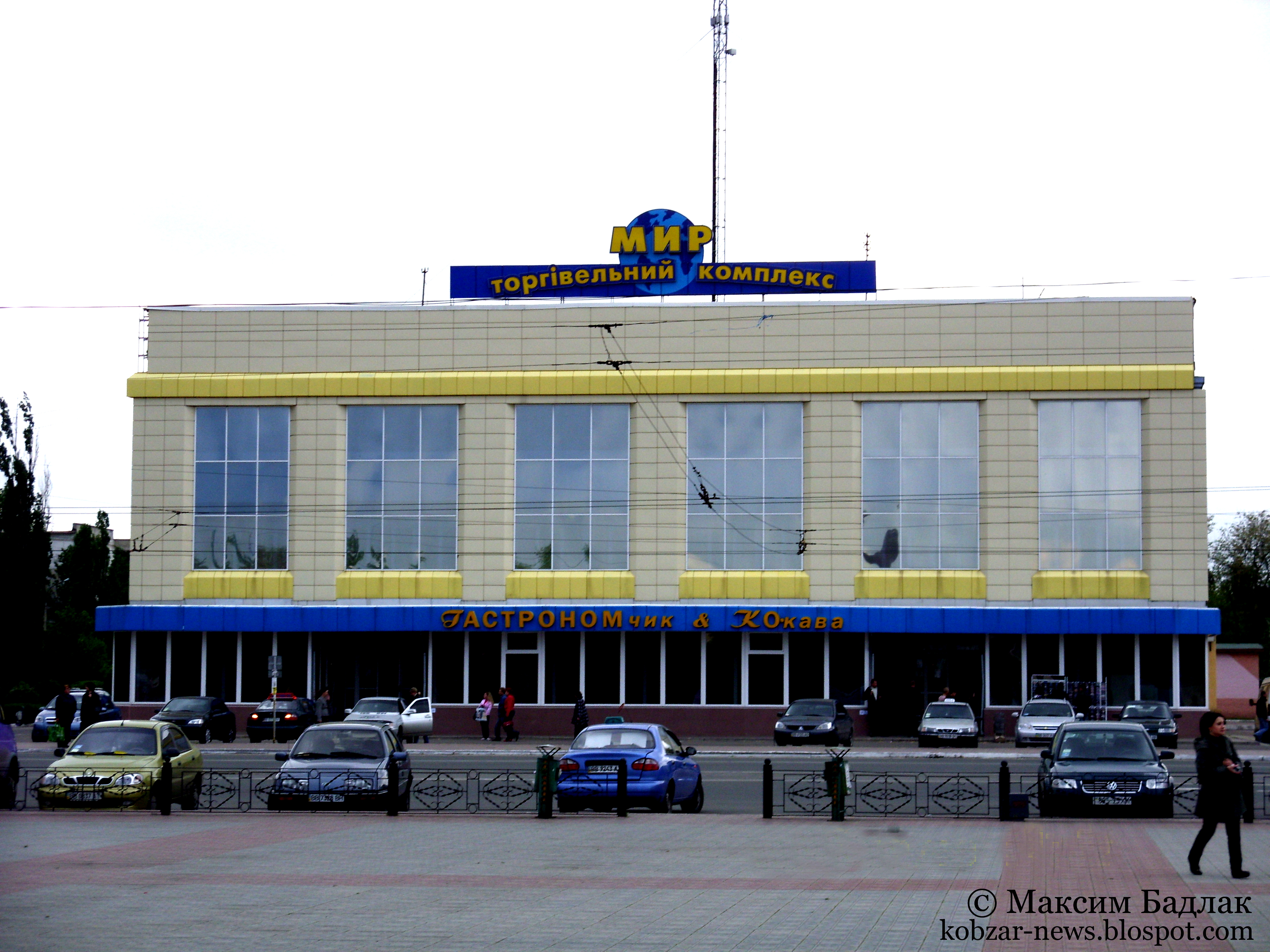 Торговельний комплекс "МИР". м. Сєвєродонецьк